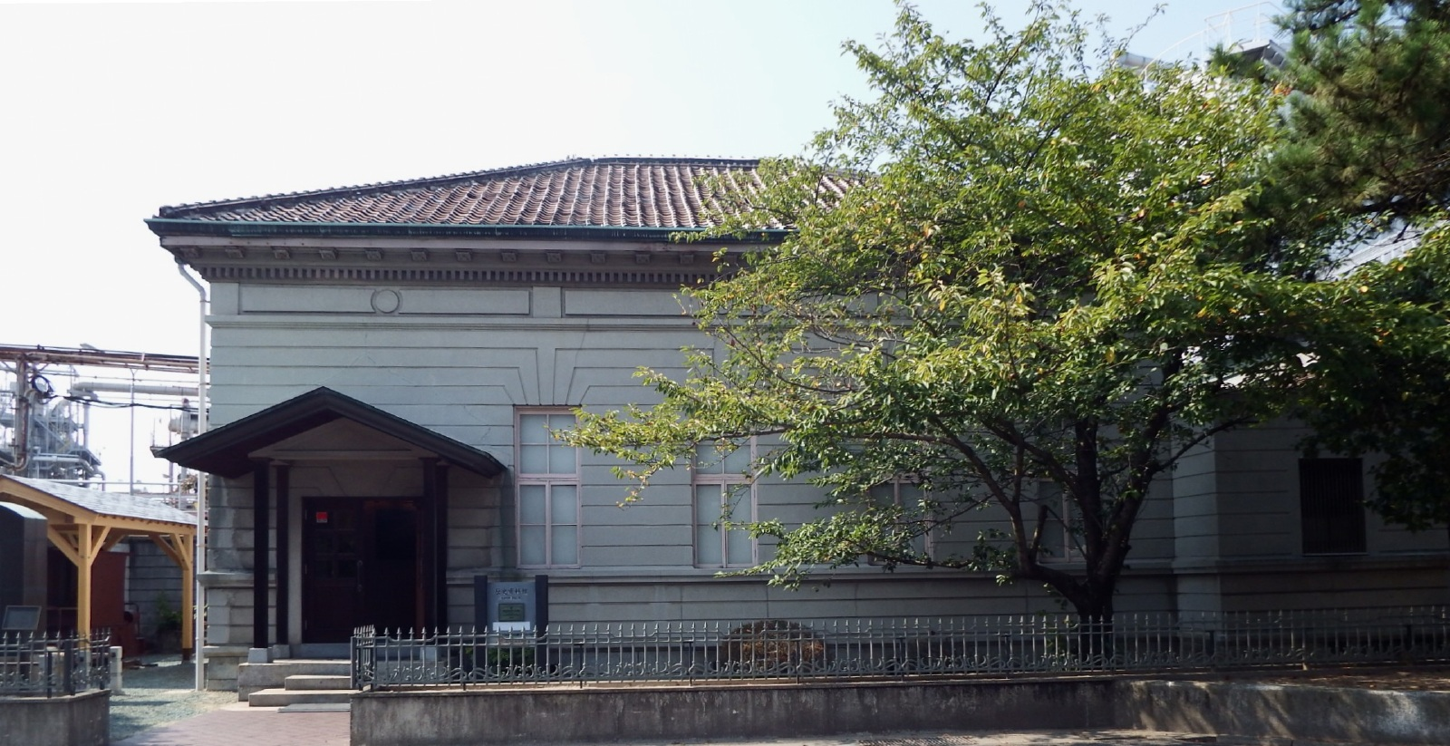 住友化学愛媛工場歴史資料館